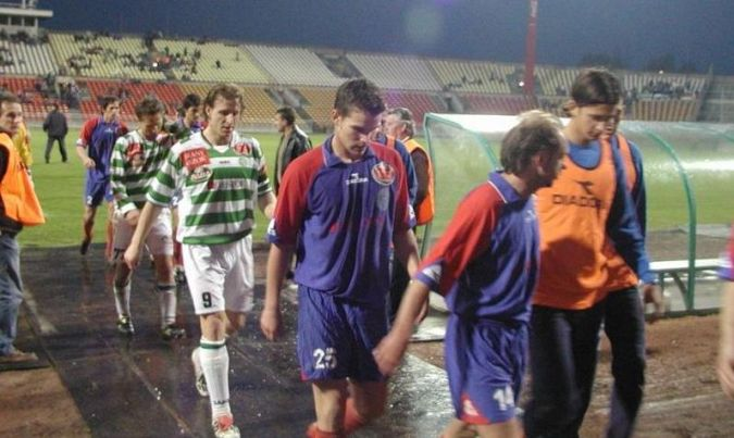 Magasföldi József amint meccsre kivonul (a második kék mezes)